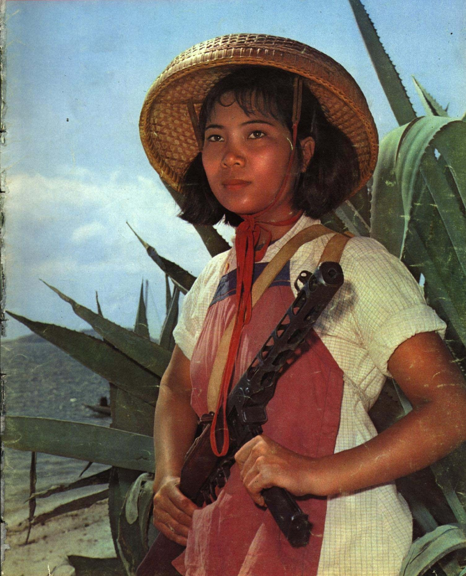 1965-6 1965年 女民兵